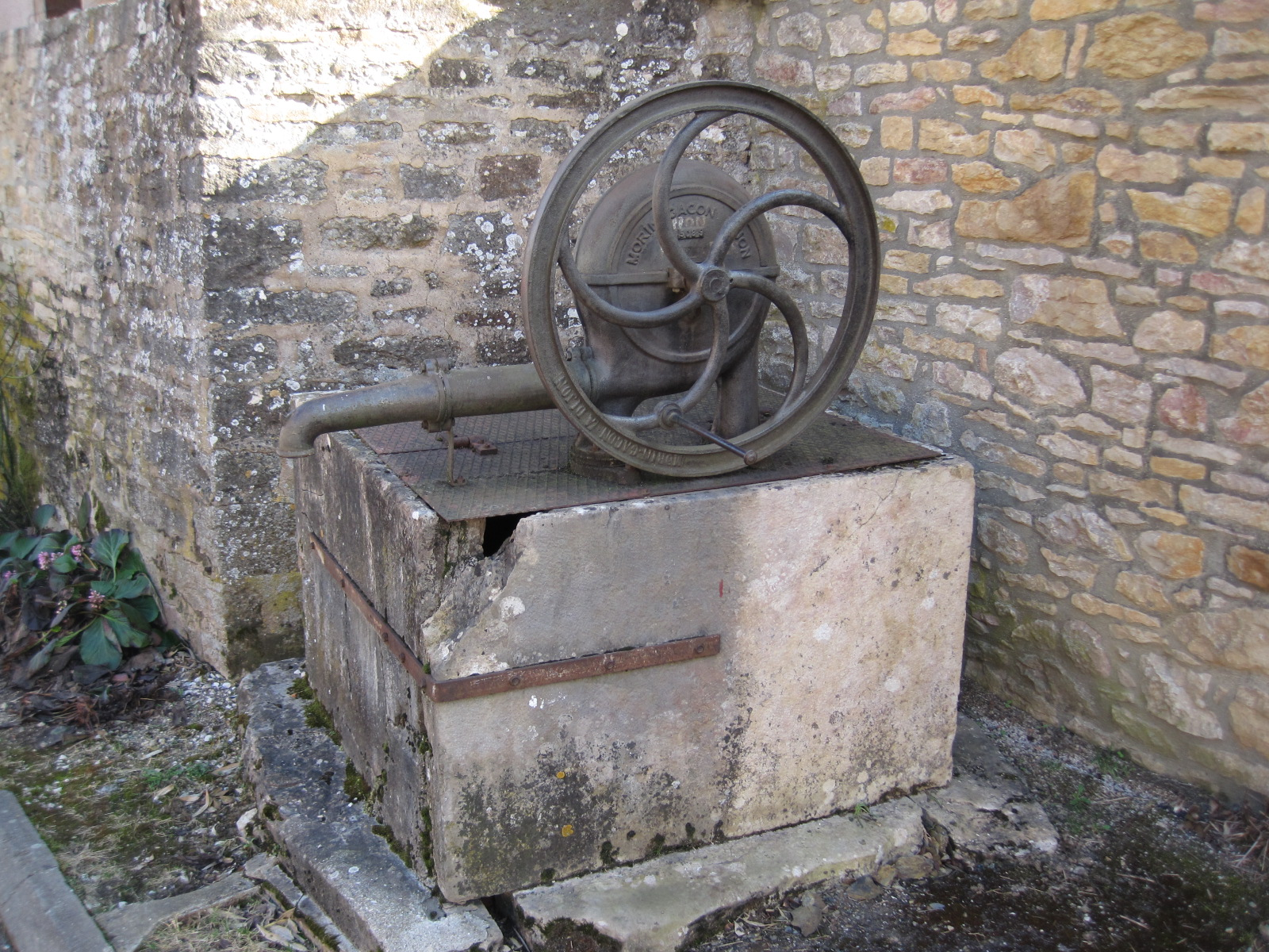 Pompe à eau de Fixin en Bourgogne en France